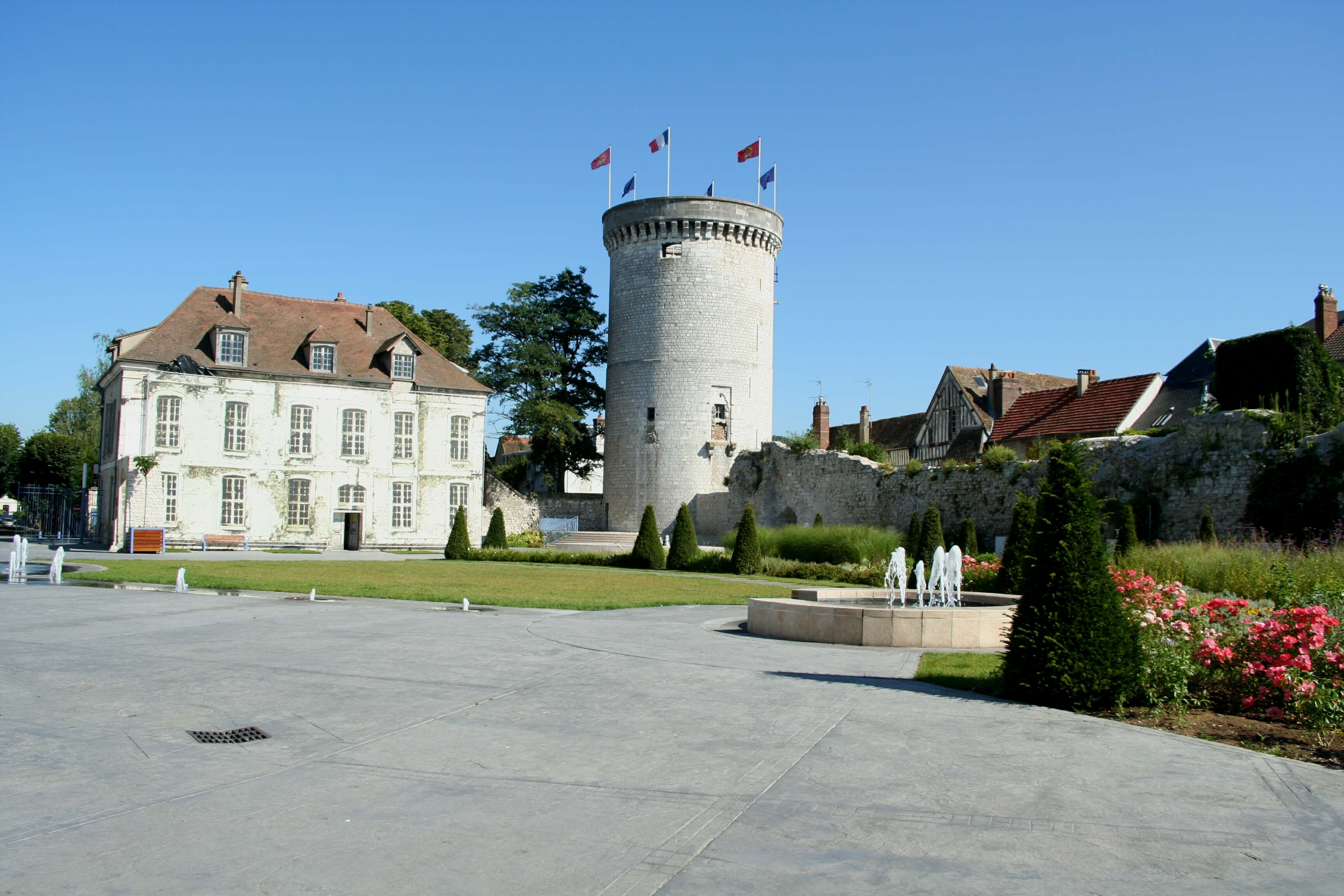 Jardin des Arts à Vernon, Eure (France) - Création du 13 janvier 2016 (inauguration).